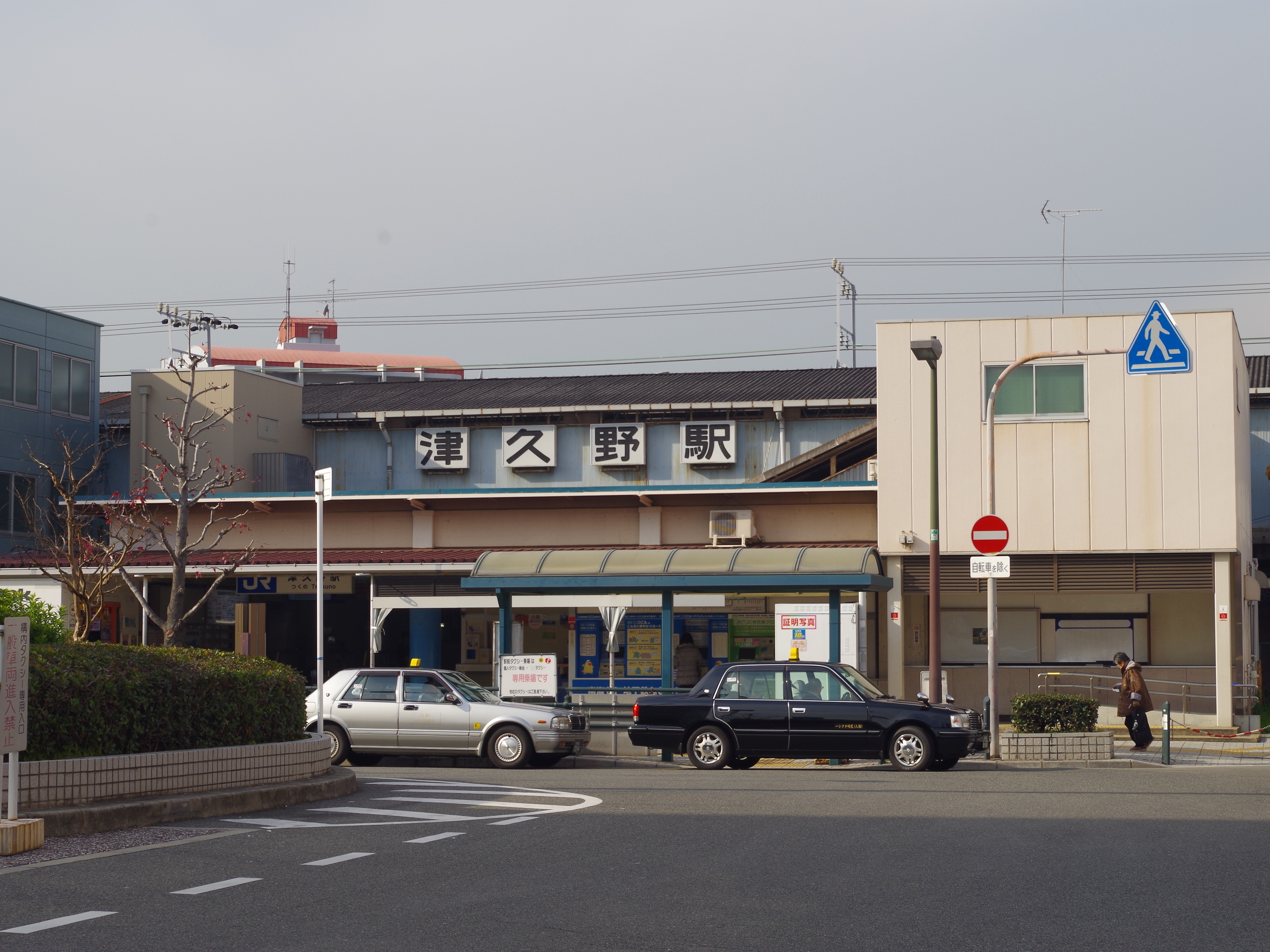 JR阪和線 津久野駅 Tsukuno station 2012.12.14